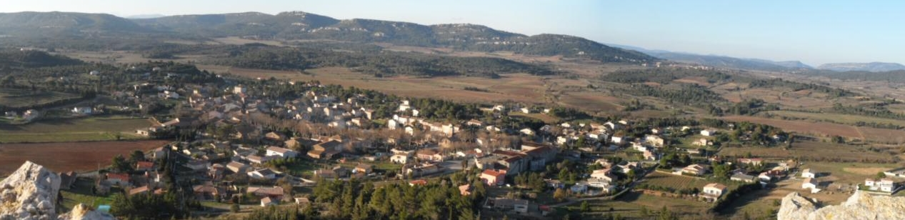 Village du Montséret depuis le château sur le rocher de Roquelongue